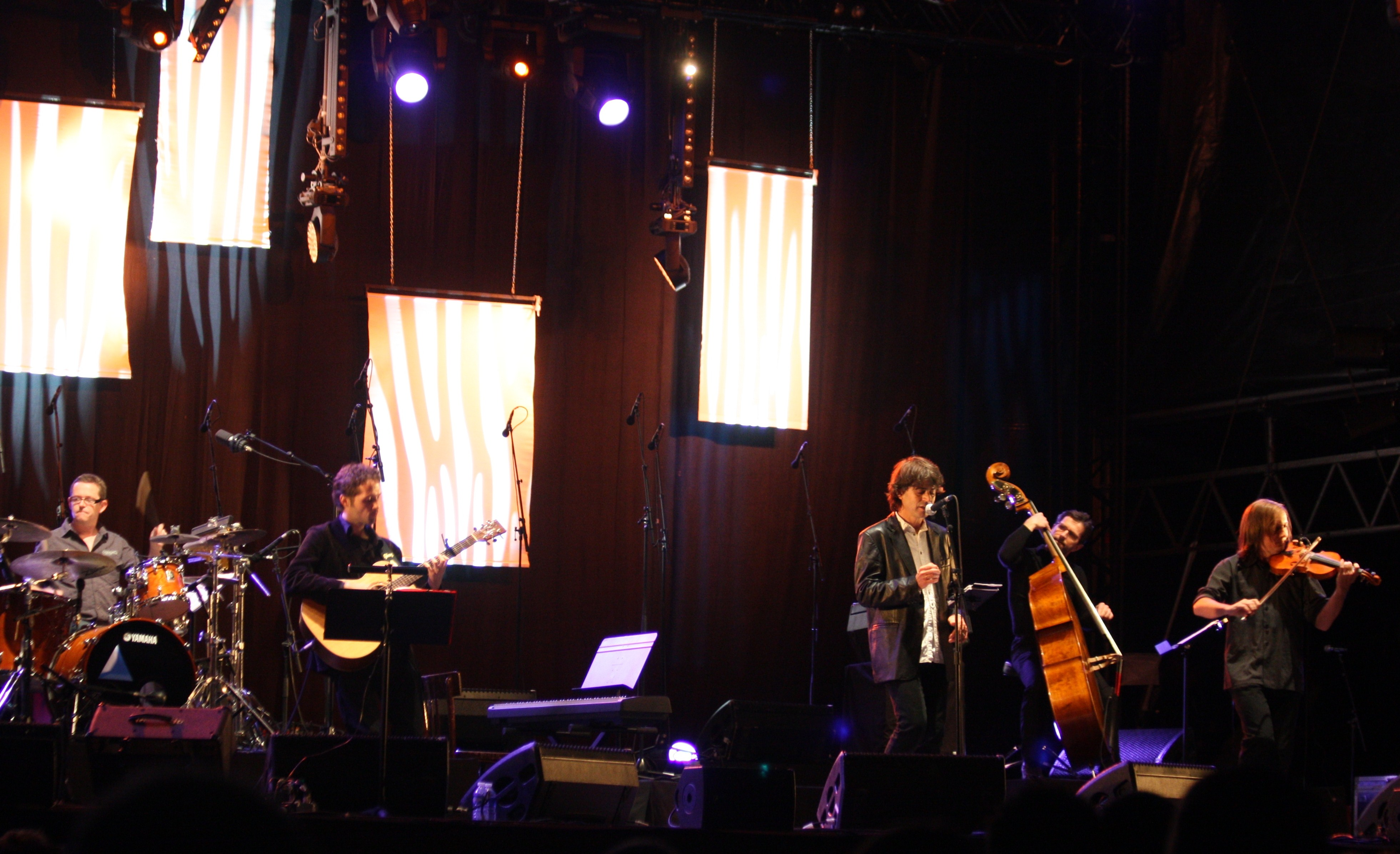 Festival des musiques traditionnelles Het Lindeboom - 2011 - Loon plage (Nord) -Concert de Denez Prigent